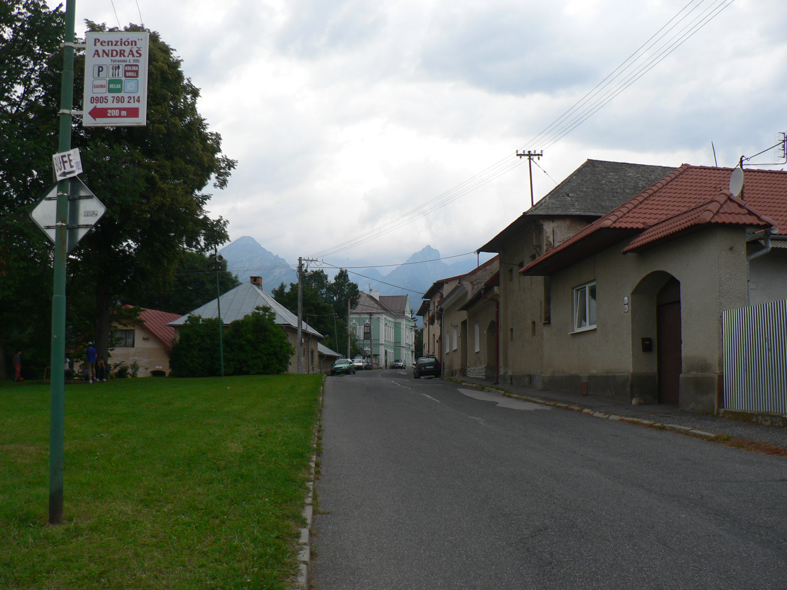 Stara Leśna, w głębi Sławkowski Szczyt i Pośrednia Grań